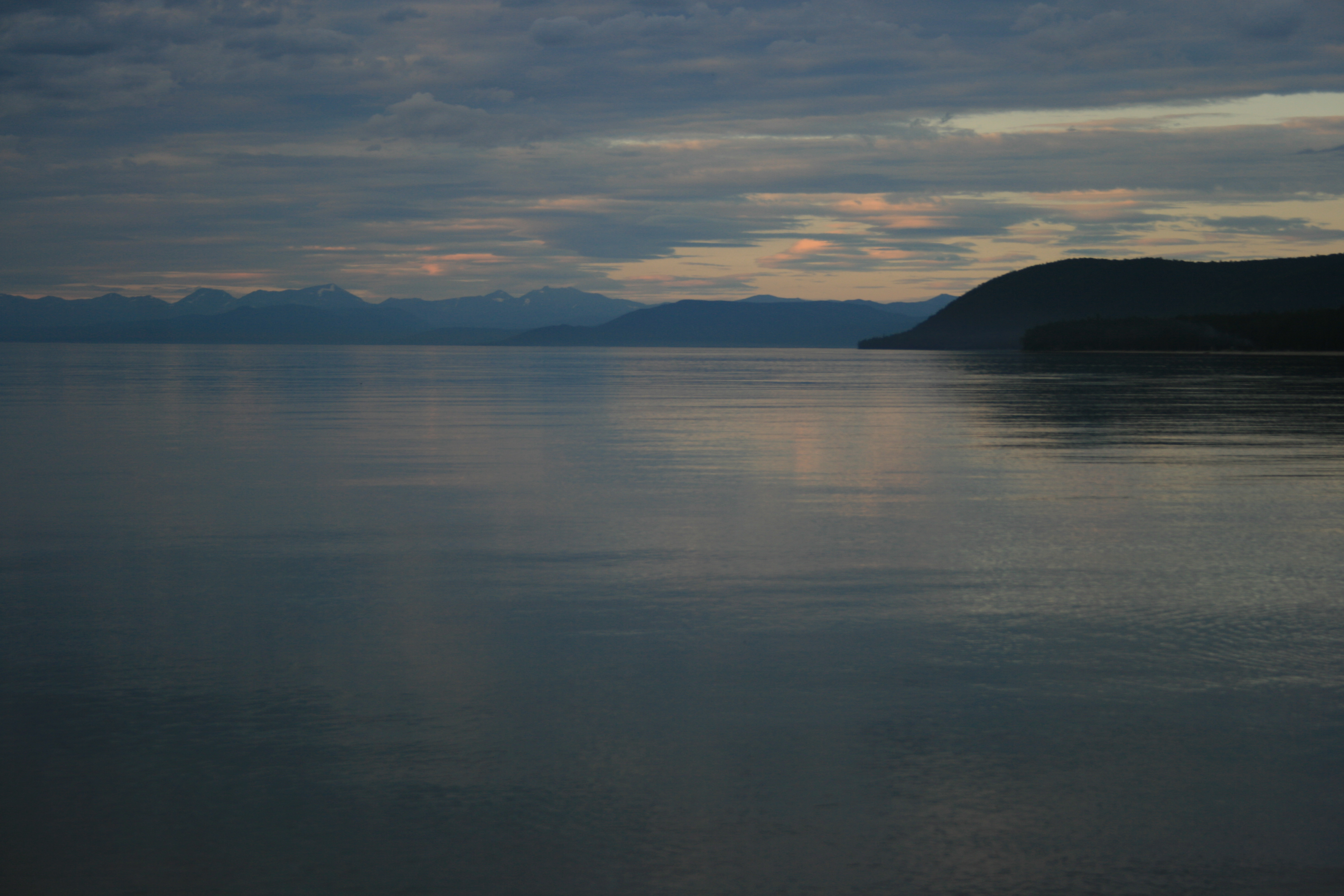 Байкал в районе Максимихи, Бурятия Максимиха, Байкал (Бурятия)